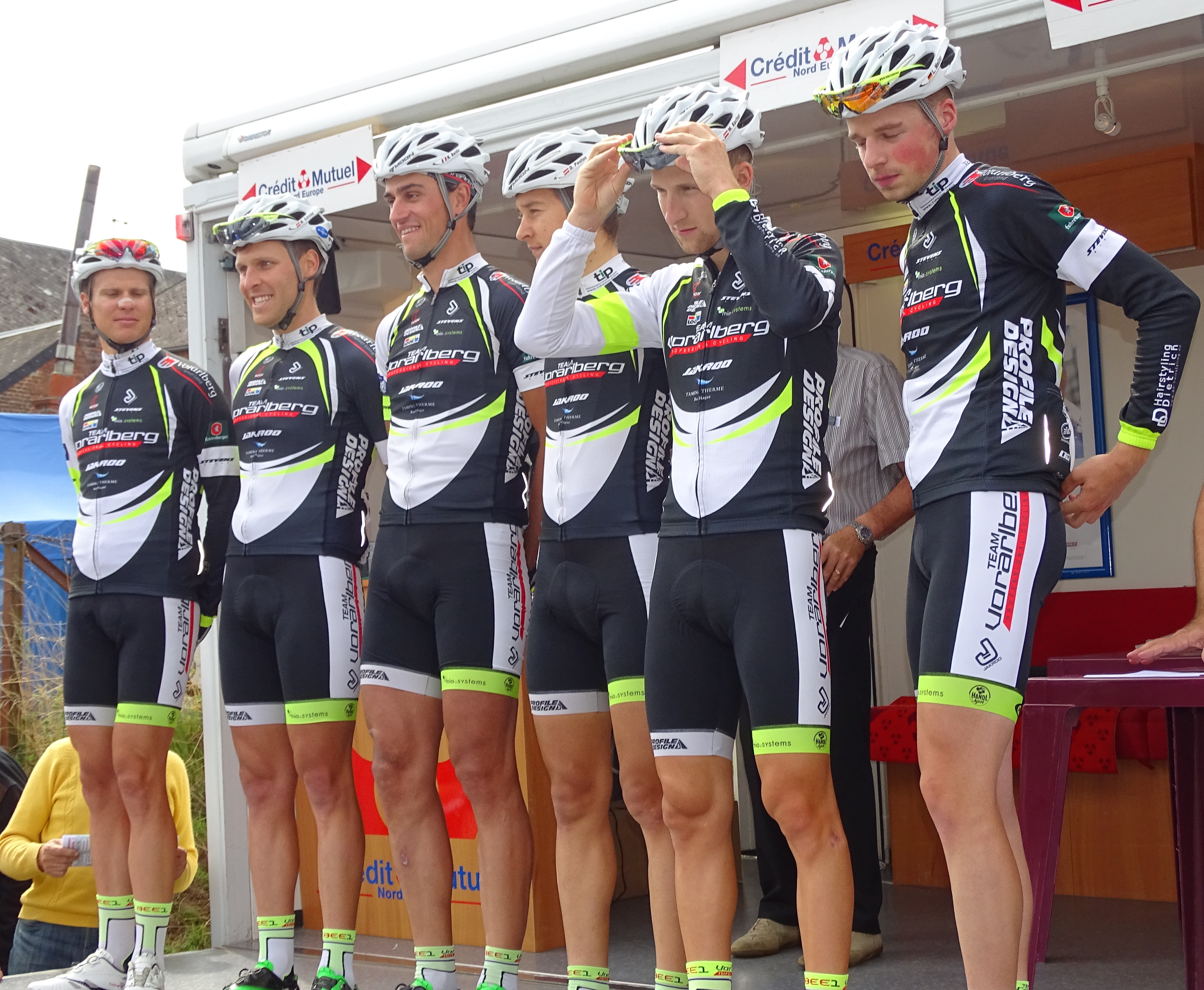 Reportage réalisé le mardi 25 août à l'occasion du départ et de l'arrivée du Grand Prix des Marbriers 2015 à Bellignies, Nord-Pas-de-Calais, France.